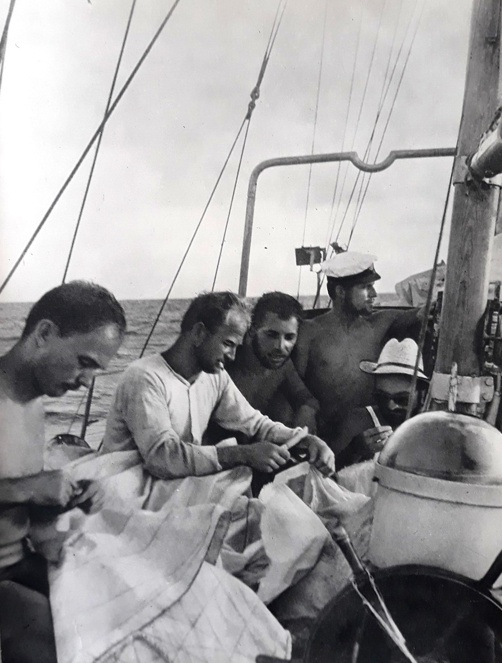 Naprawa żagli na pokładzie "Śmiałego"